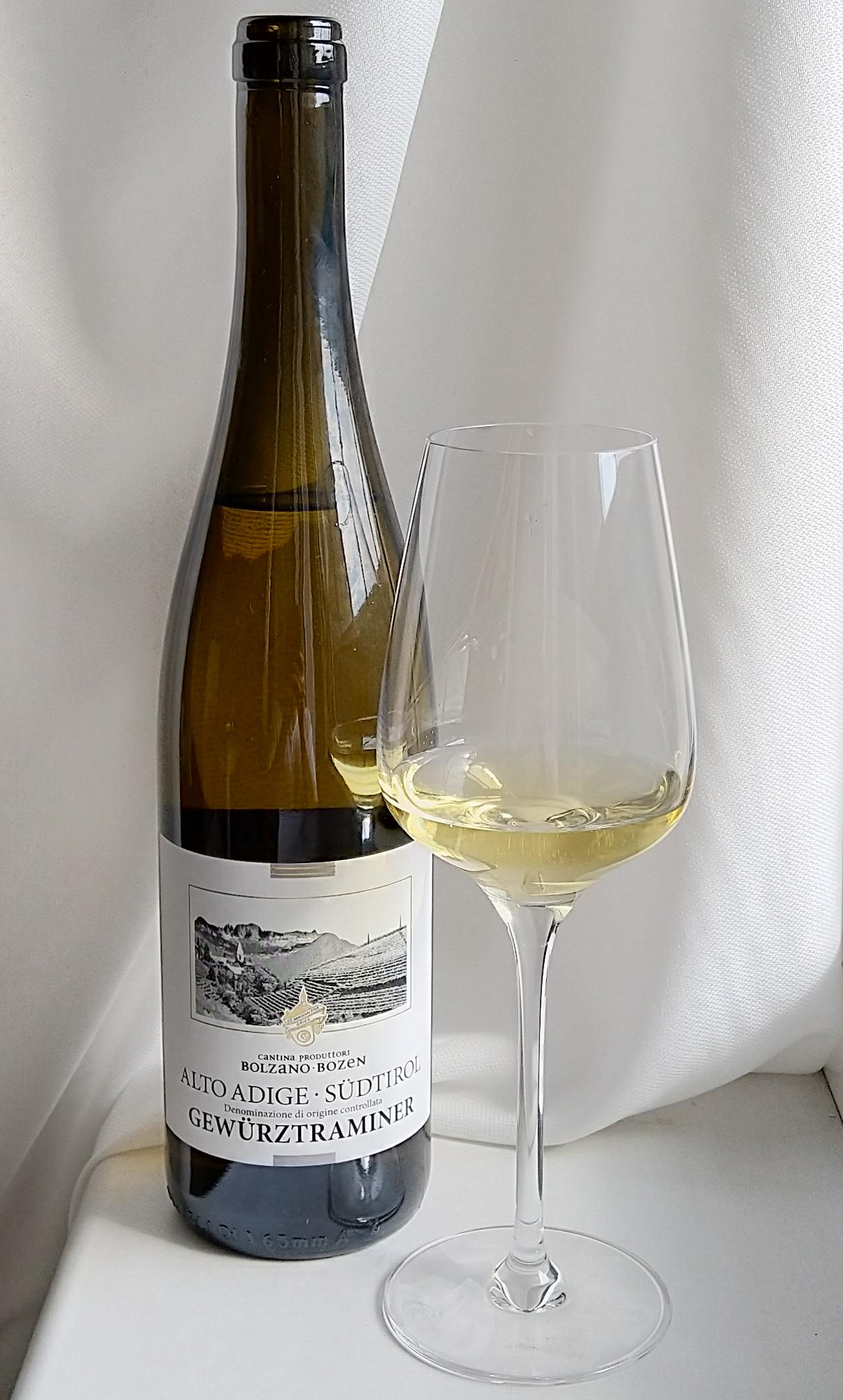 Gewurztraminer sudtirol wine